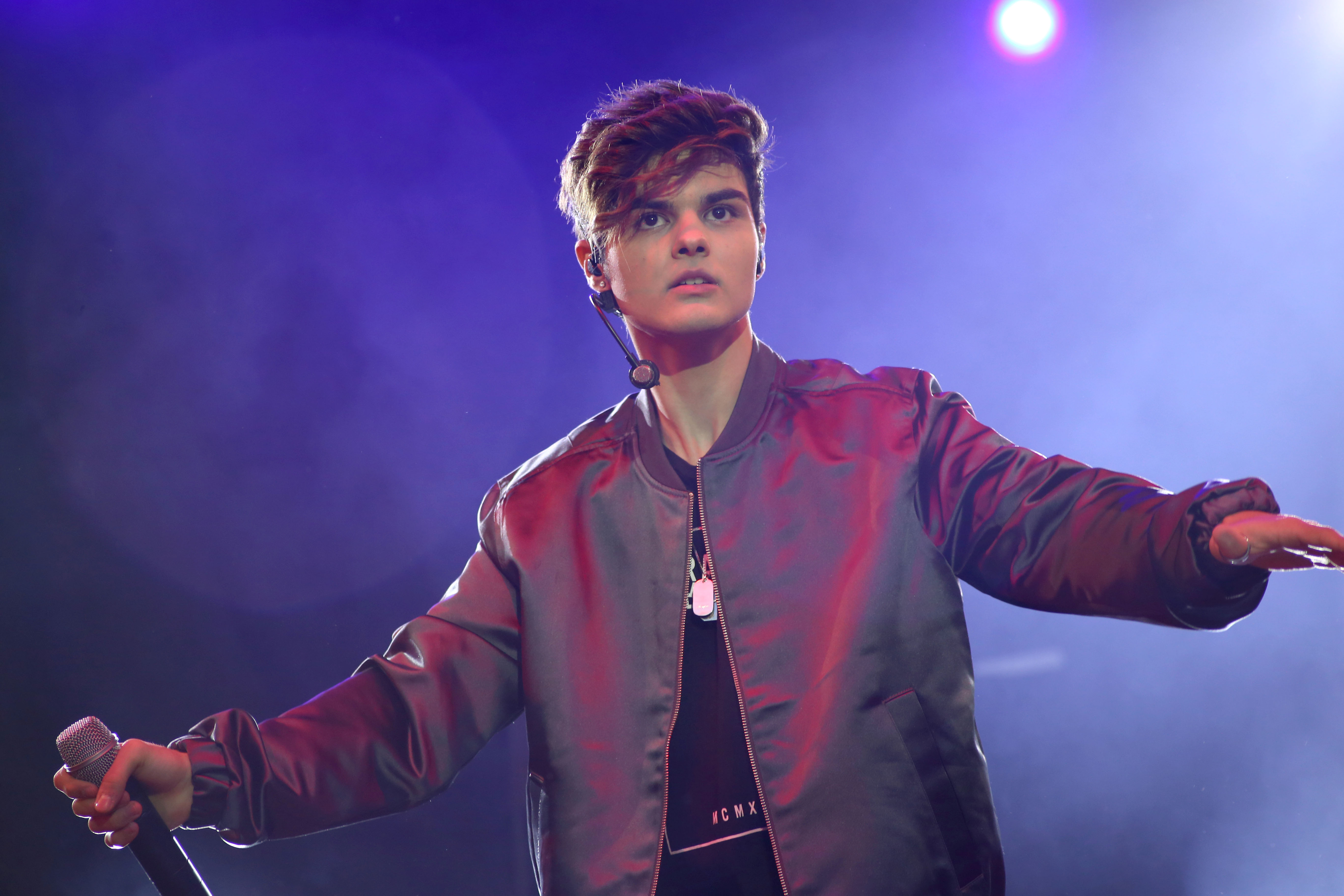 Abraham Mateo en la plaza mayor de Valladolid en el inicio de su gira 2016